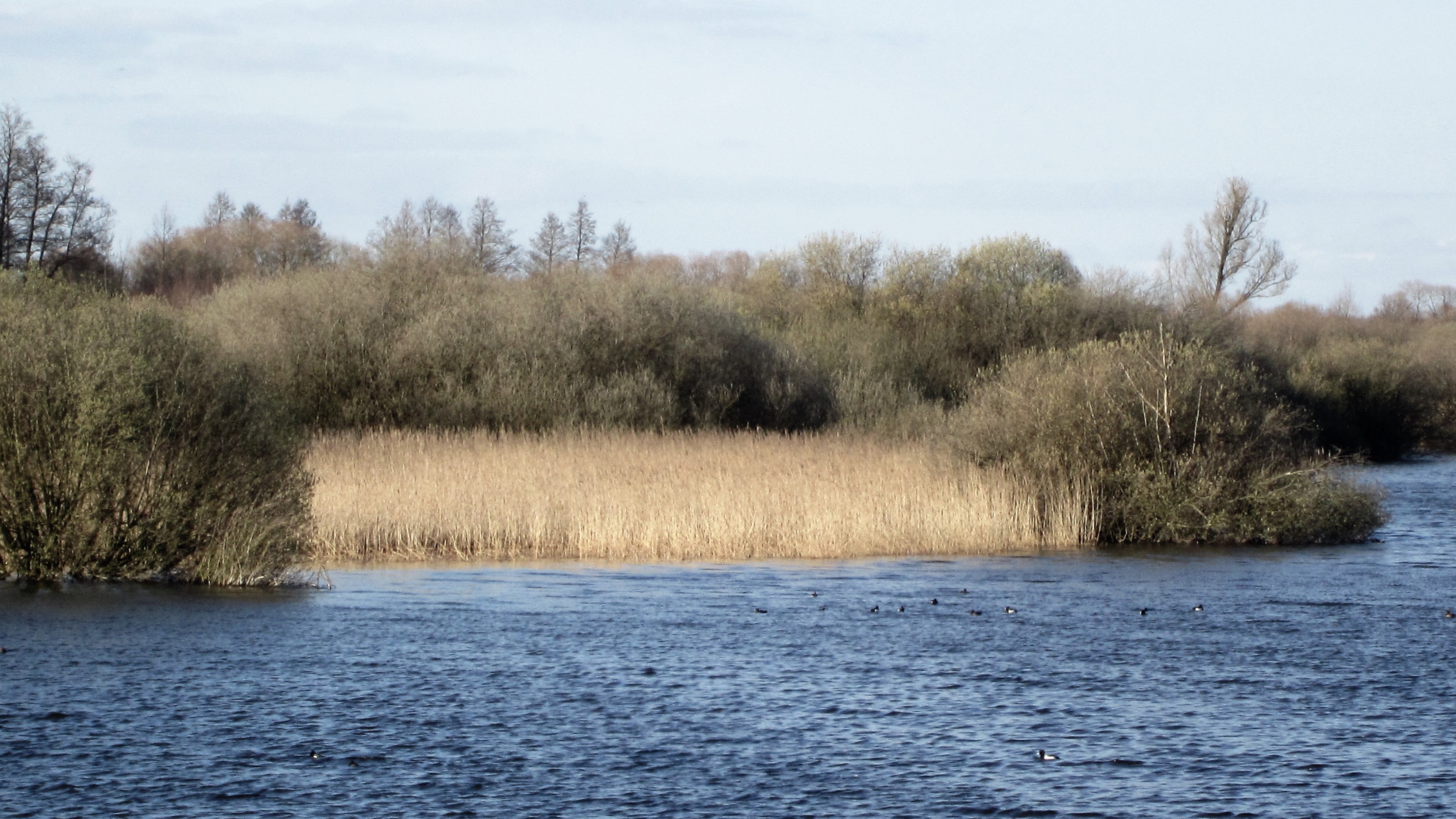 Blick in Richtung Norden vom Aussichtsturm beim Olgahafen entlang dem Westufer des Dümmers